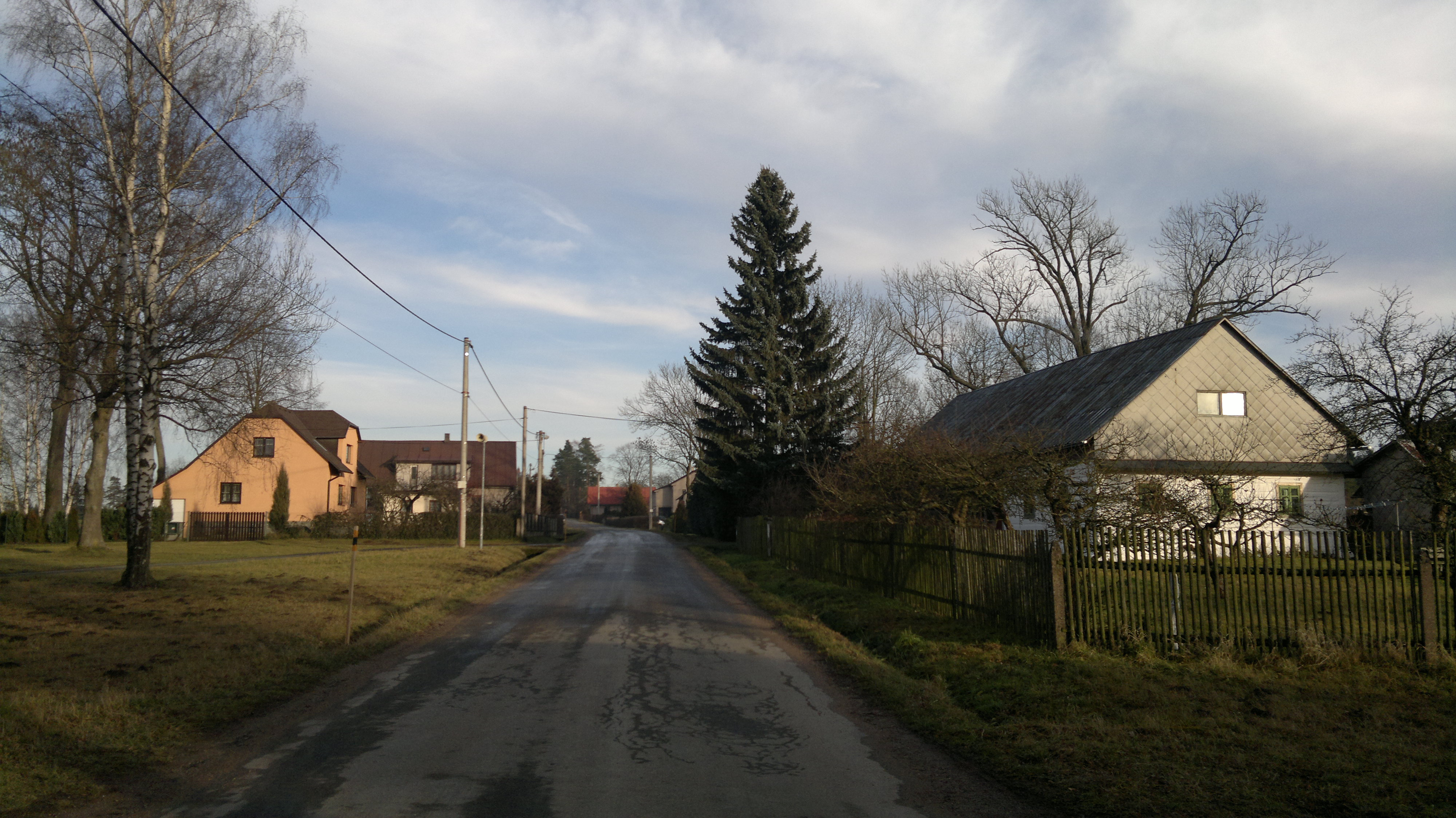 Obec Všeradov v okrese Chrudim